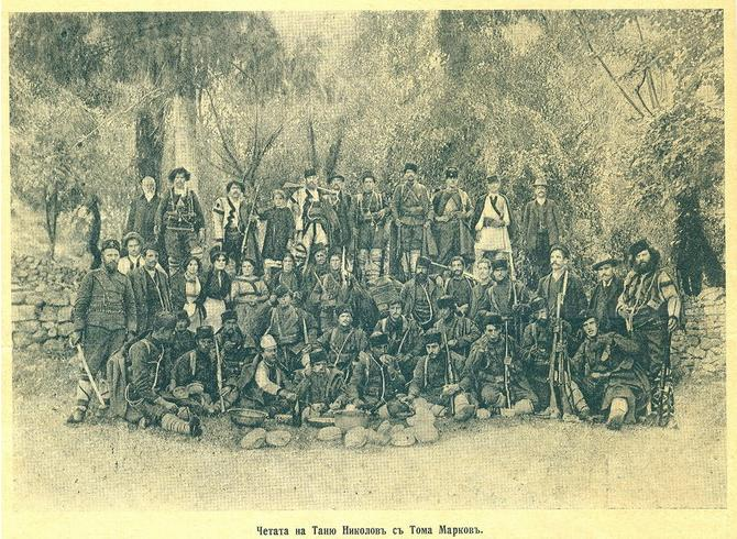 Четата на Тане Николов.